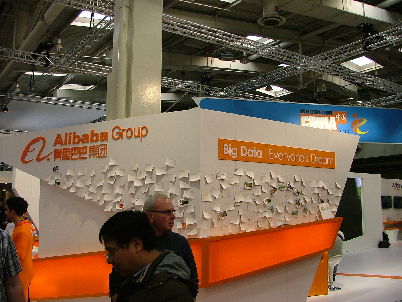 CeBIT 2015 in Hannover